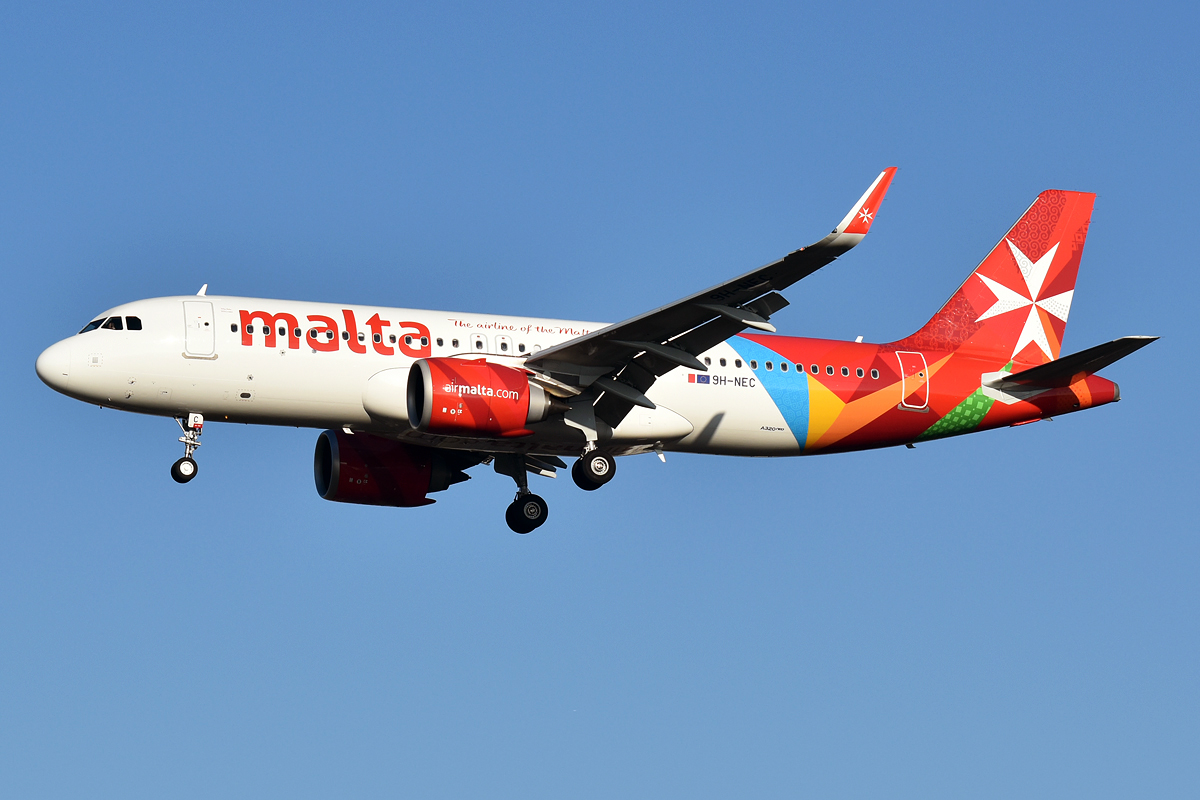 Air Malta, 9H-NEC, Airbus A320-251N